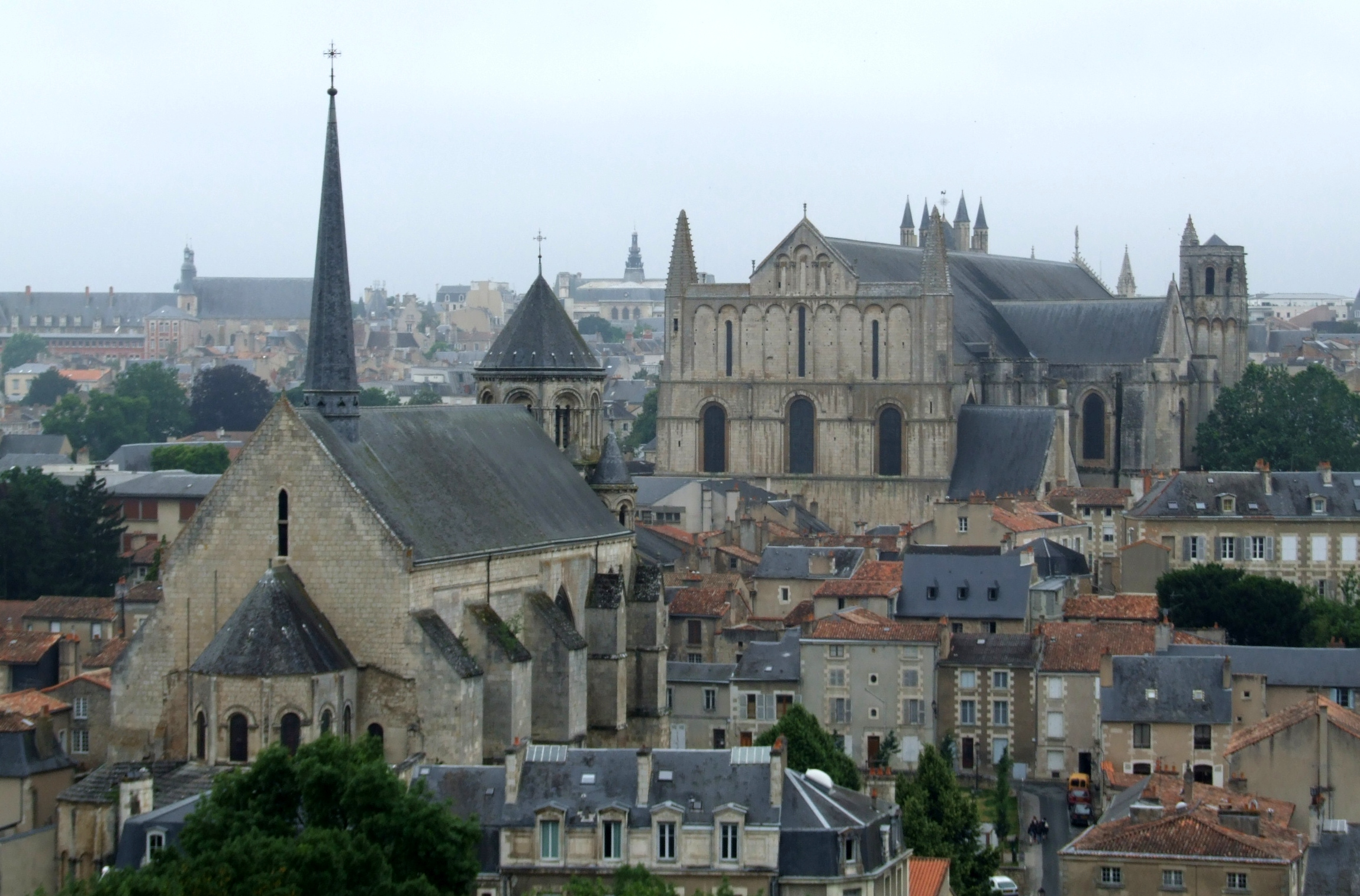 Église Sainte-Radegonde, Poitiers, Poitou-Charentes, FRANCE